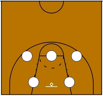 Basketball Zone Defense